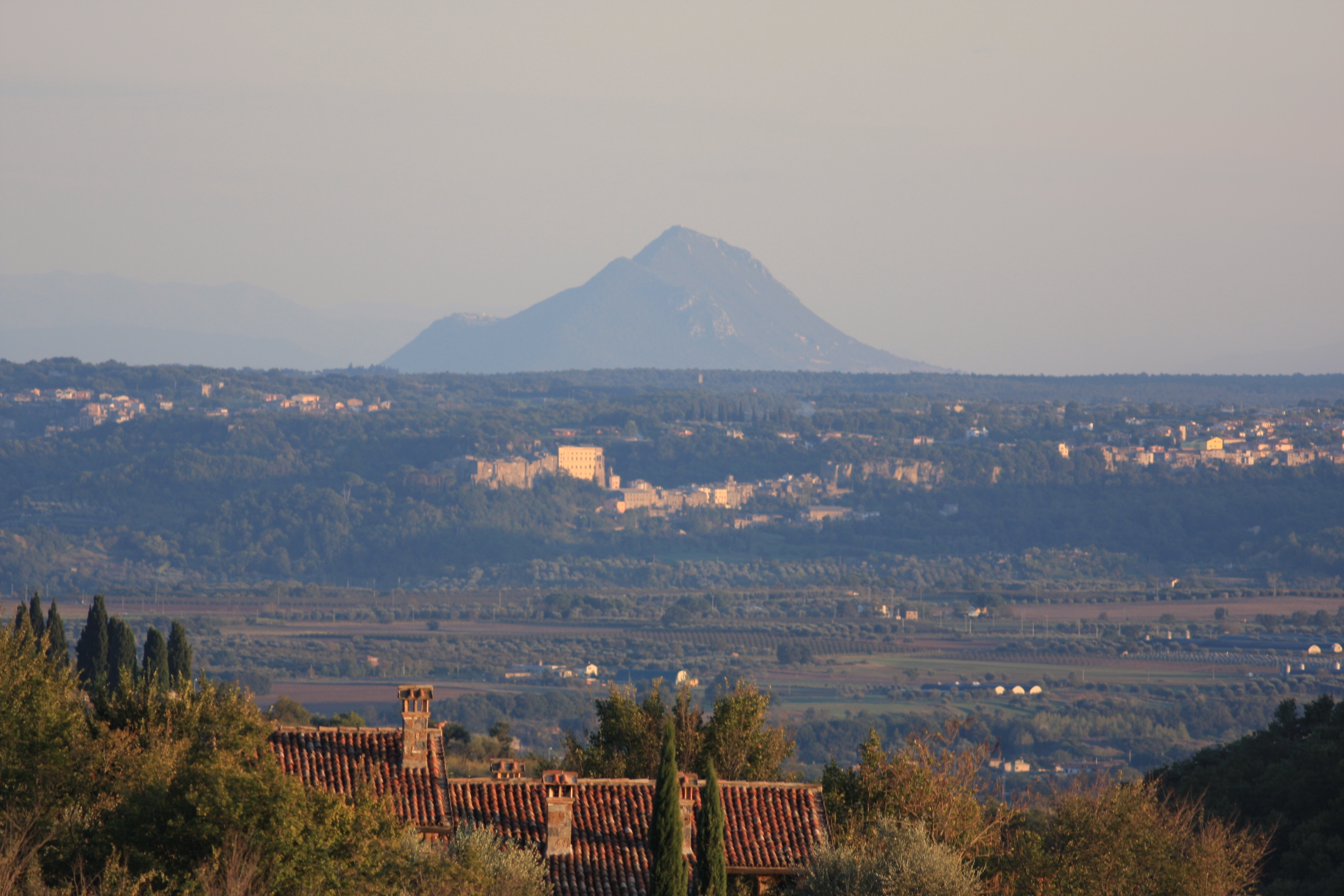 Veduta del Monte Soratte da Castel Cellesi (VT)